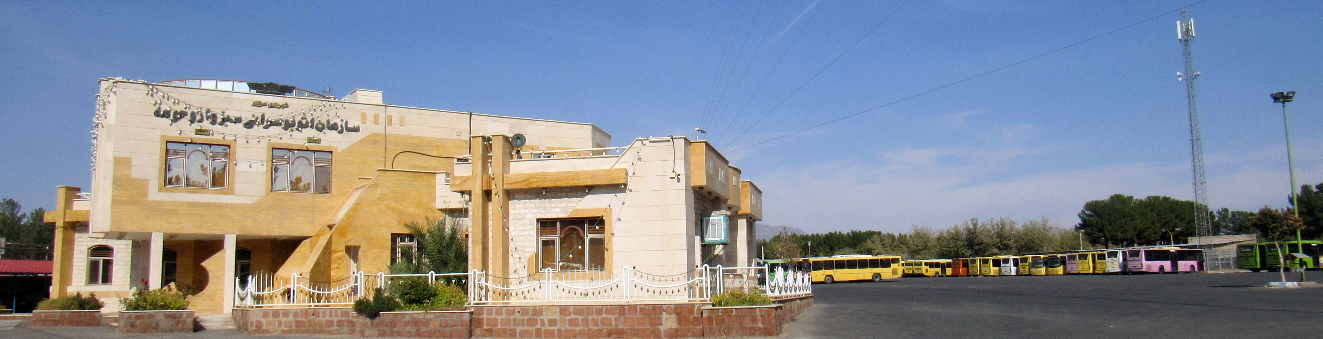 سازمان اتوبوسرانی سبزوار و حومه